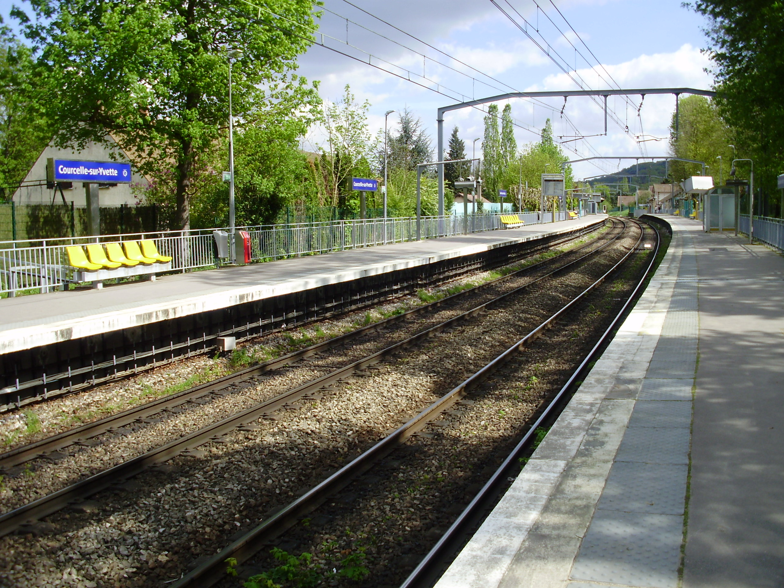 Gare de Courcelle-sur-Yvette, à Gif-sur-Yvette, Essonne, France (quais et voies en regardant vers Aéroport CDG 2/Mitry - Claye)